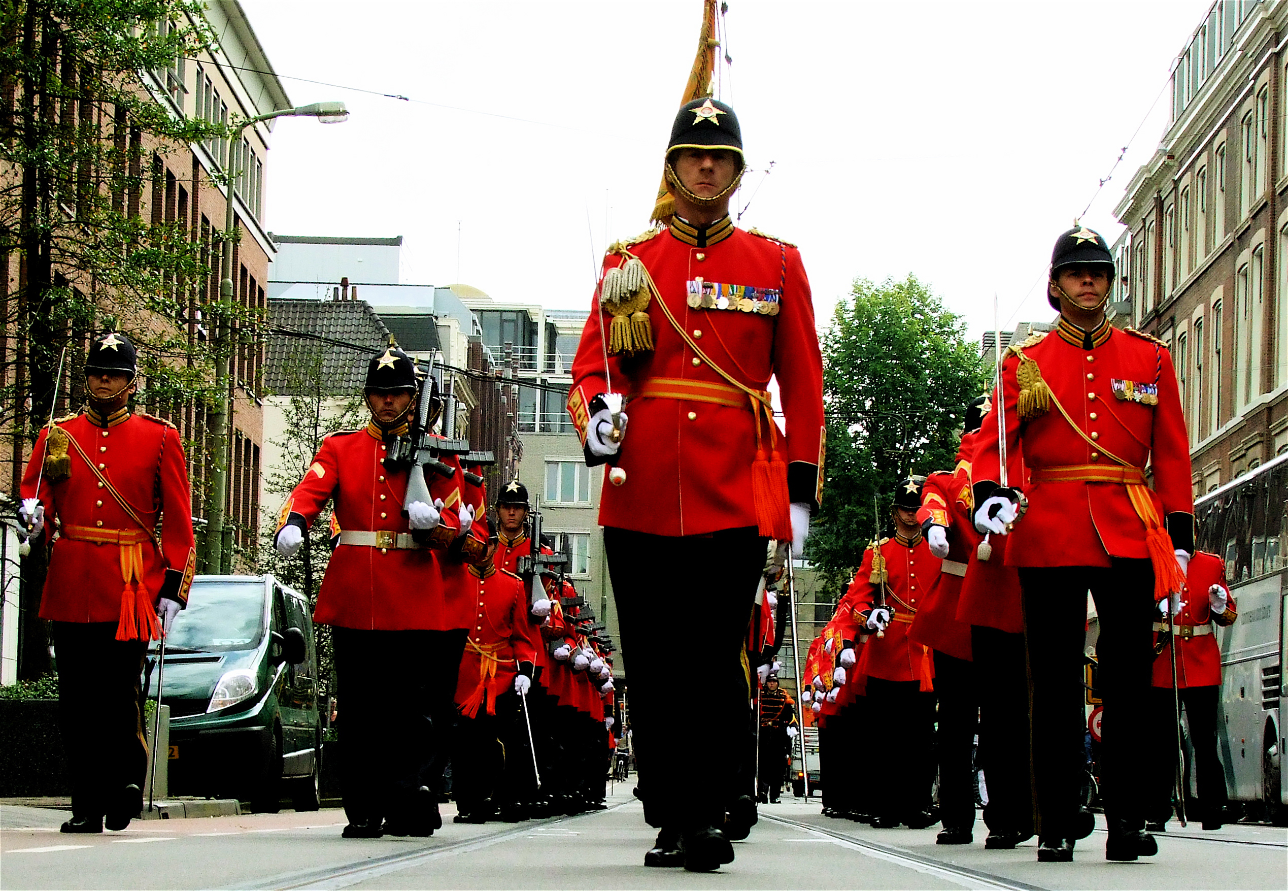 Foto van het Garderegiment Fuseliers Prinses Irene, gemaakt tijdens prinsjesdag in Den Haag